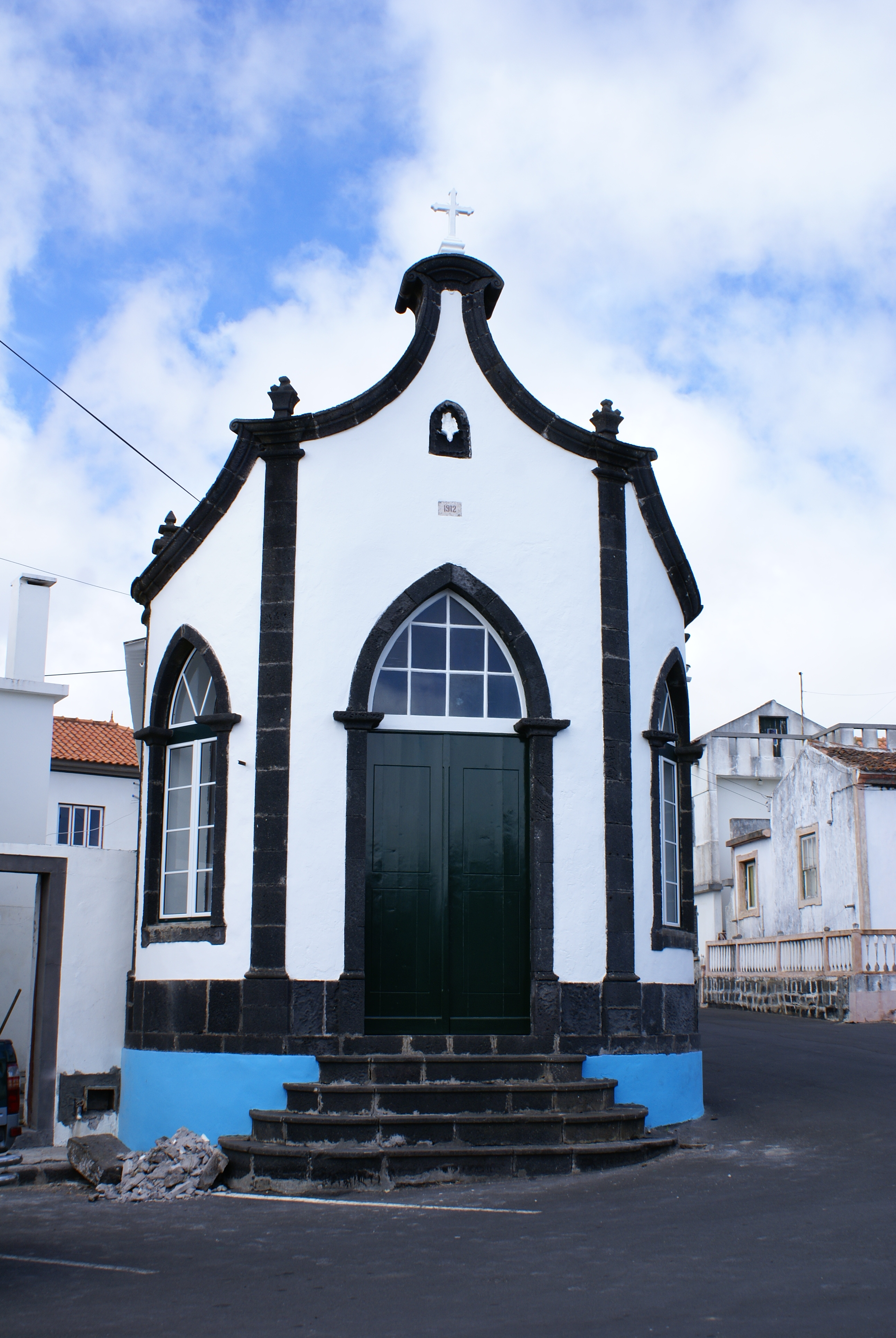 Império do Espírito Santo de Nossa Senhora da Guia, ilha Graciosa, Açores, Portugal